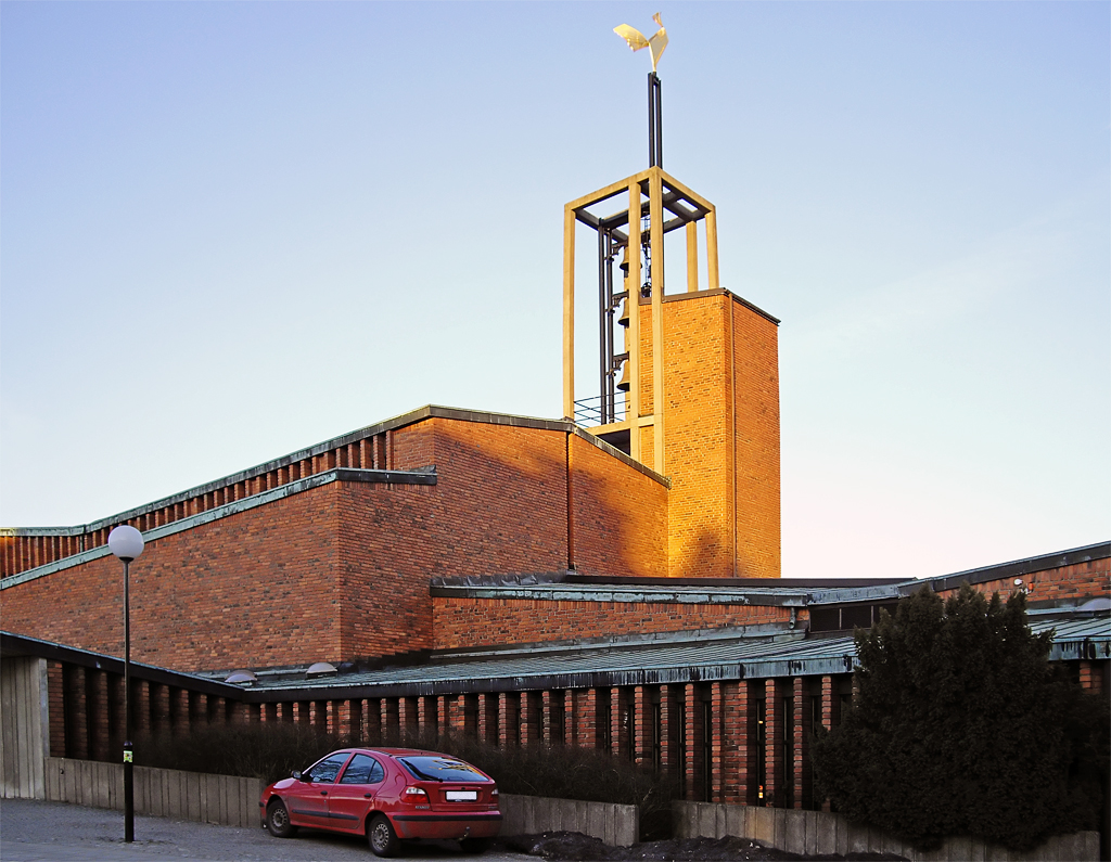 Vantörs kyrka utanför Stockholm.